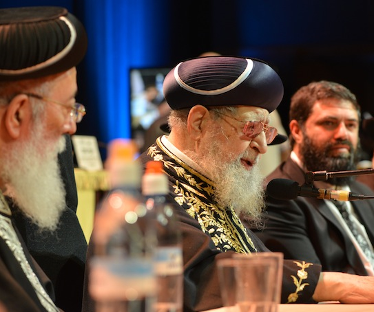 הרב עמוס שושן, הרב עובדיה, והרב שלמה עמר